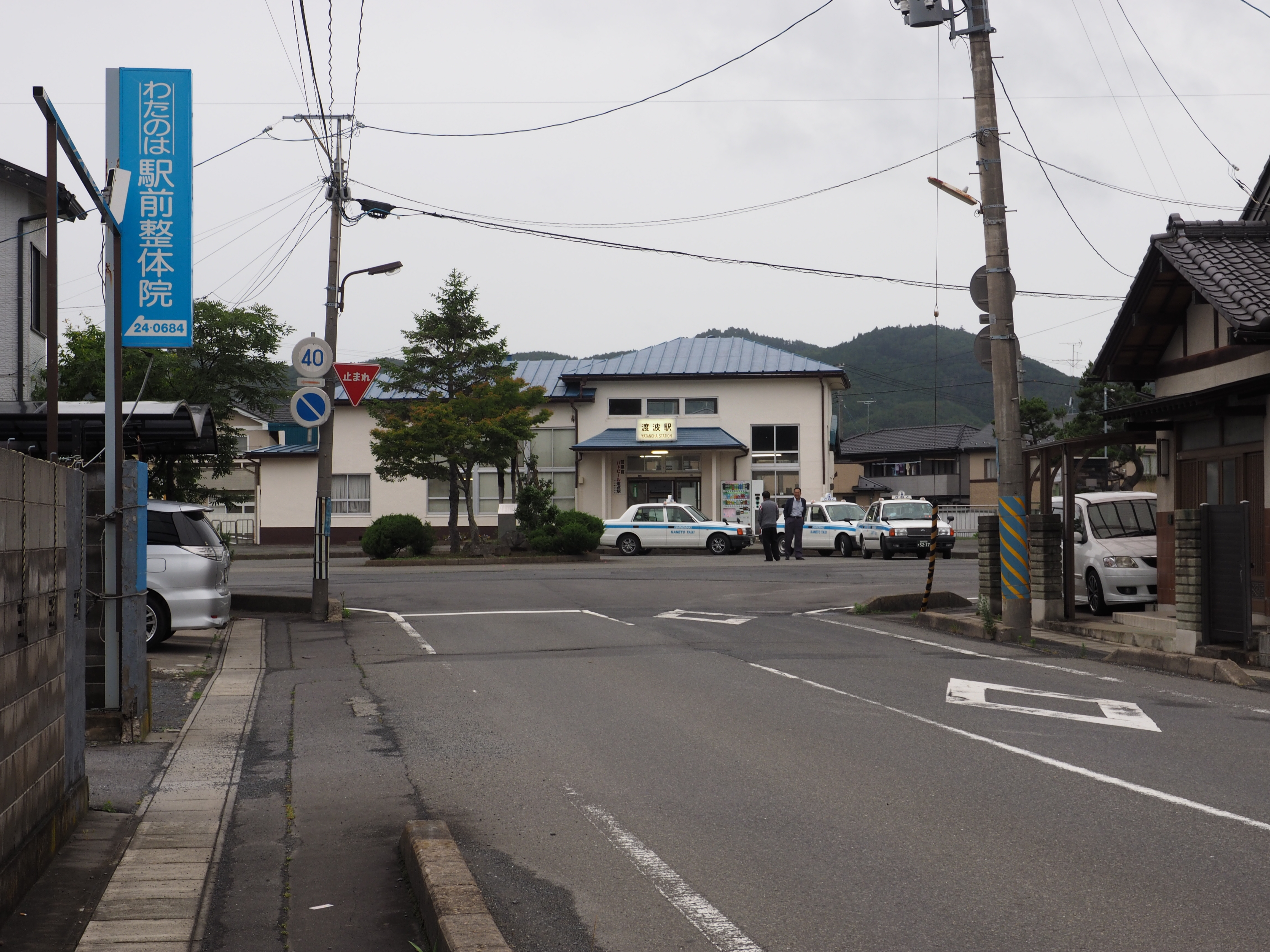 渡波駅に通じる宮城県道193号渡波停車場線。宮城県石巻市。